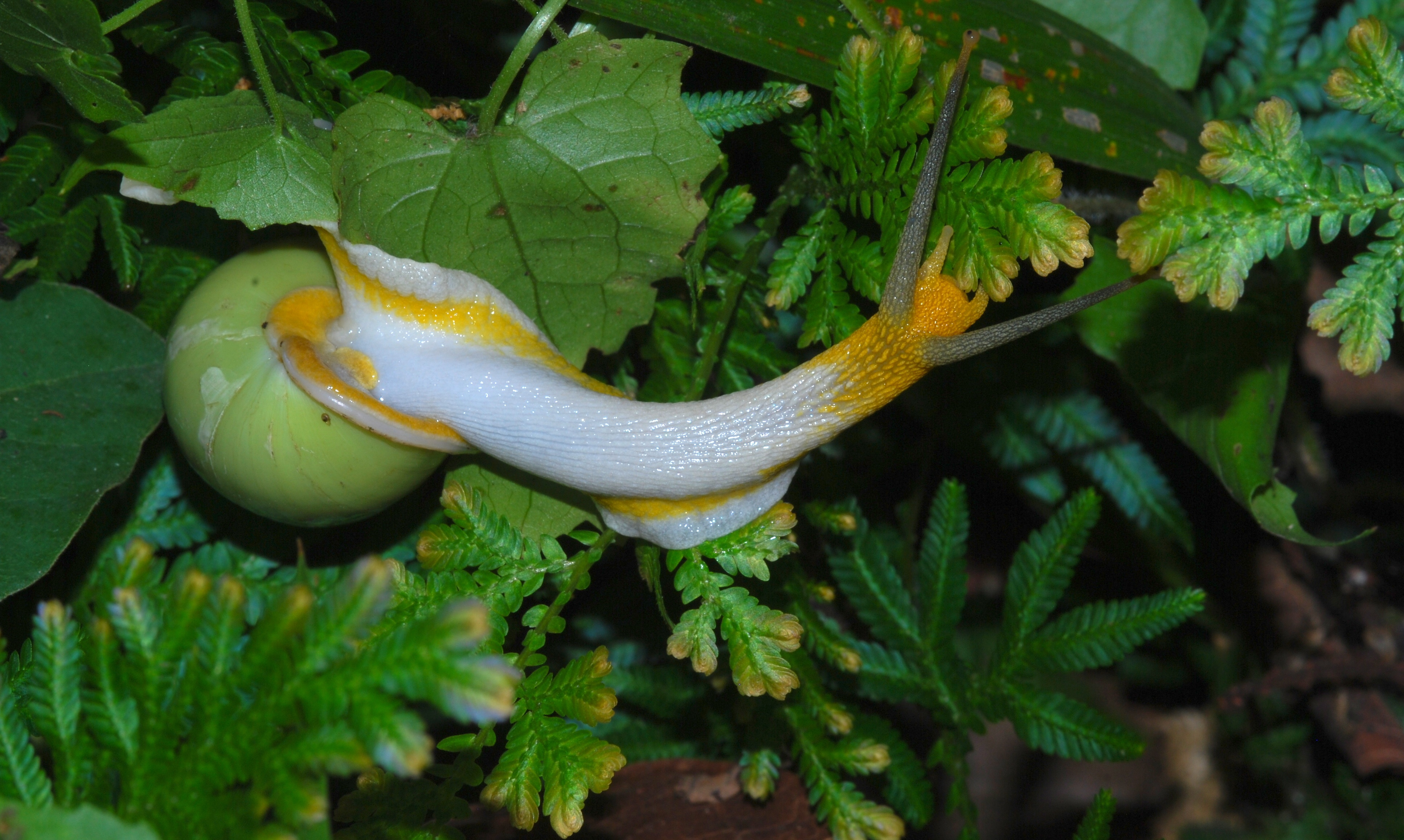 Taman Negara NP, Pahang, MALAYSIA